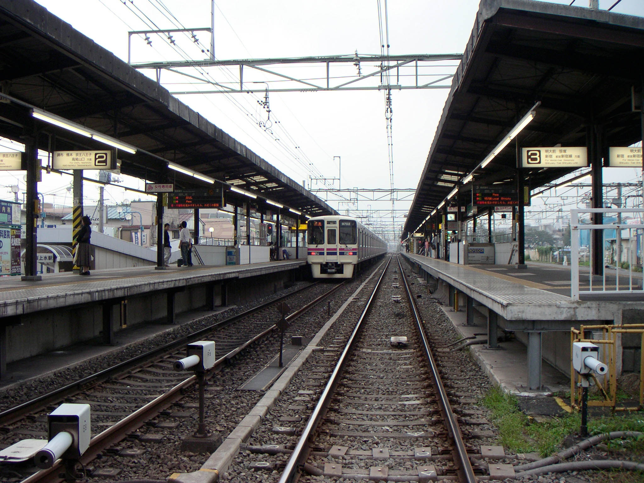 Sakurajosui Station, Keio Line, Tokyo